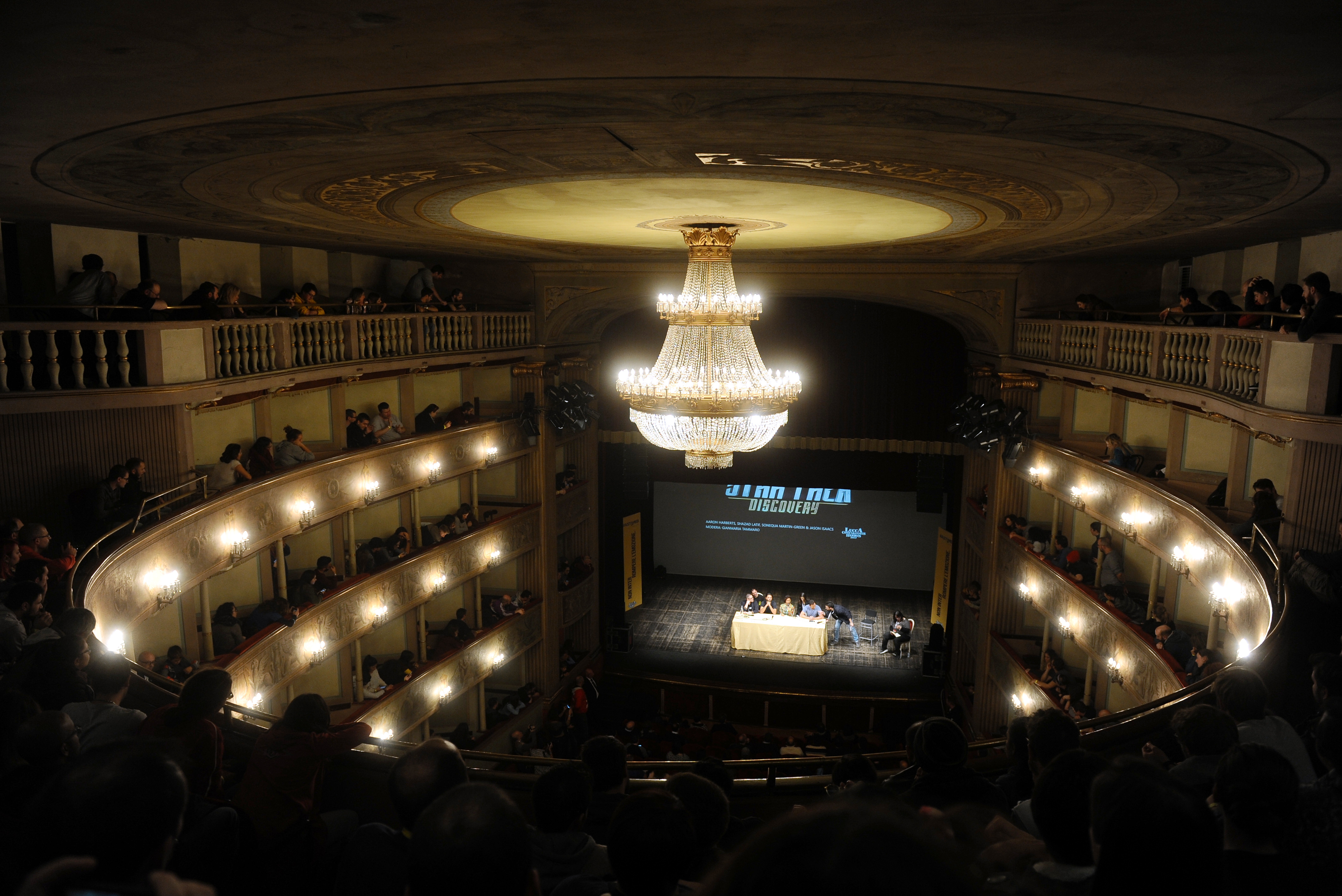 Teatro del Giglio durante un incontro su Star Trek: Discovery con Aaron Roberts, Shazad Latif, Sonequa Martin-Green e Jason Isaacs. Lucca.